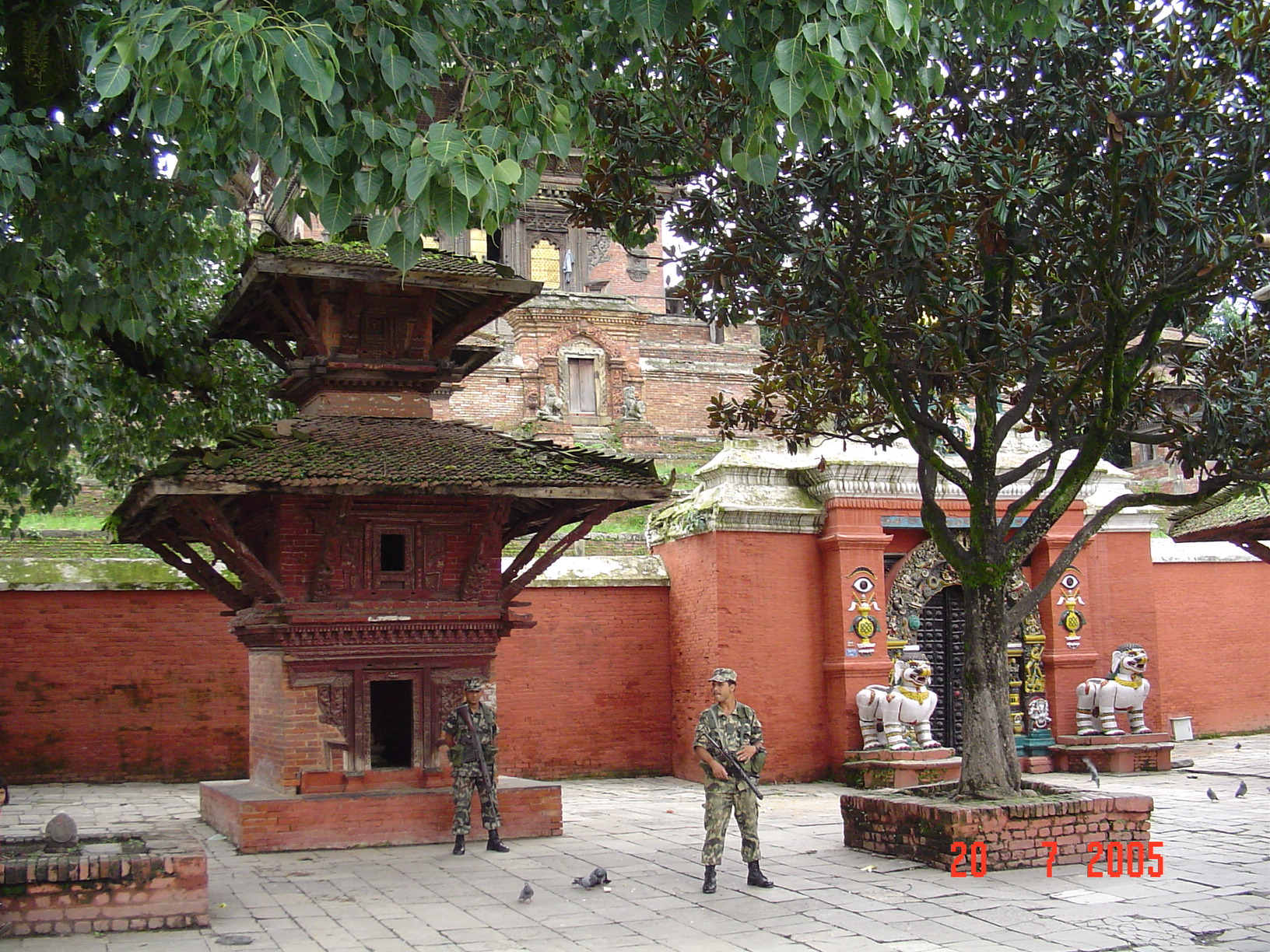 Храм ТаледжуУ входа в храм Таледжу, Катманду, Непал